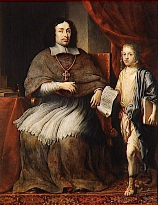 Ferdinand de Furstenberg , Evêque de Paderborn recevant la thèse du jeune Hendrick Daemen